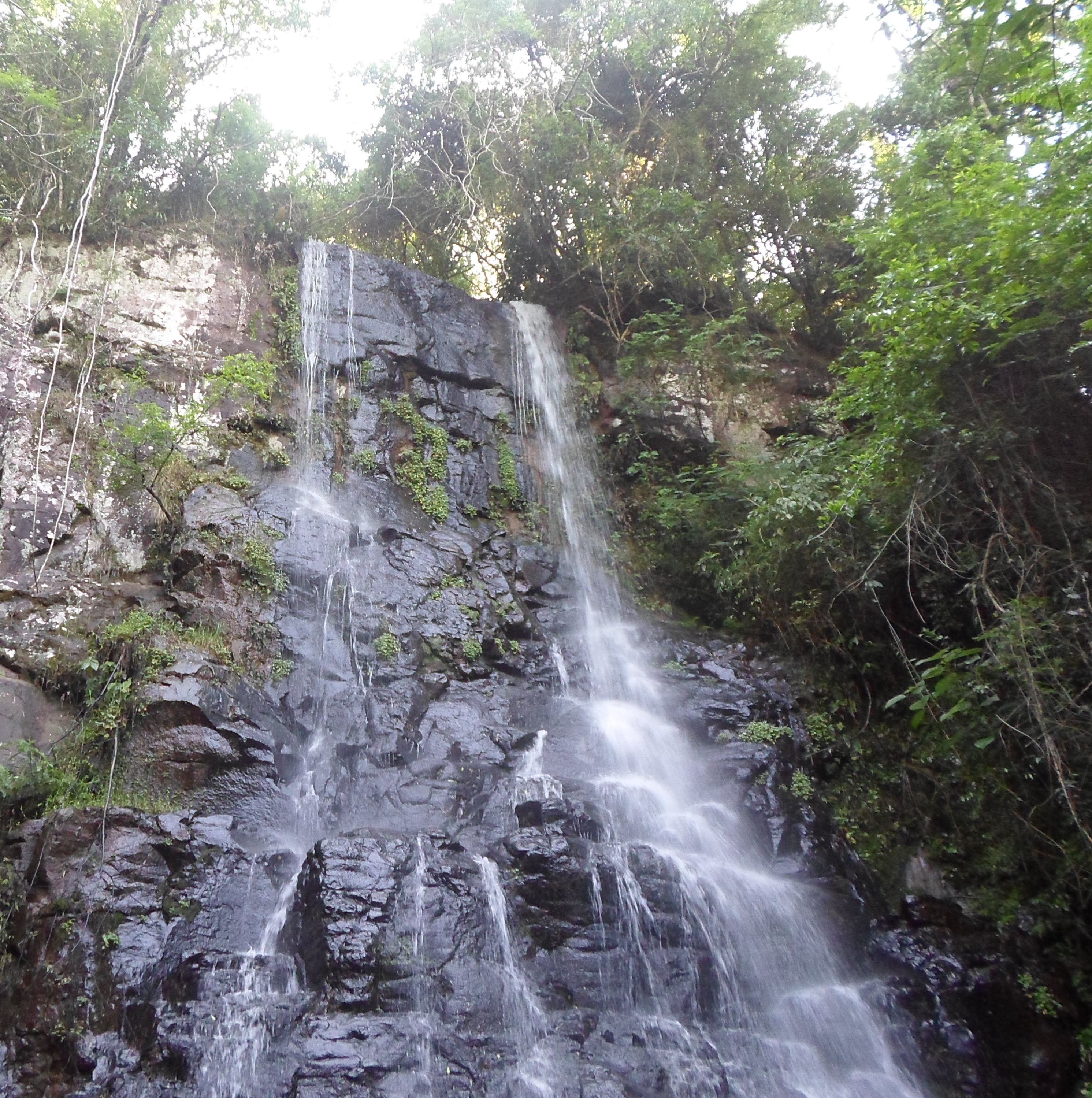 Salto Arco Iris, visto desde abajo